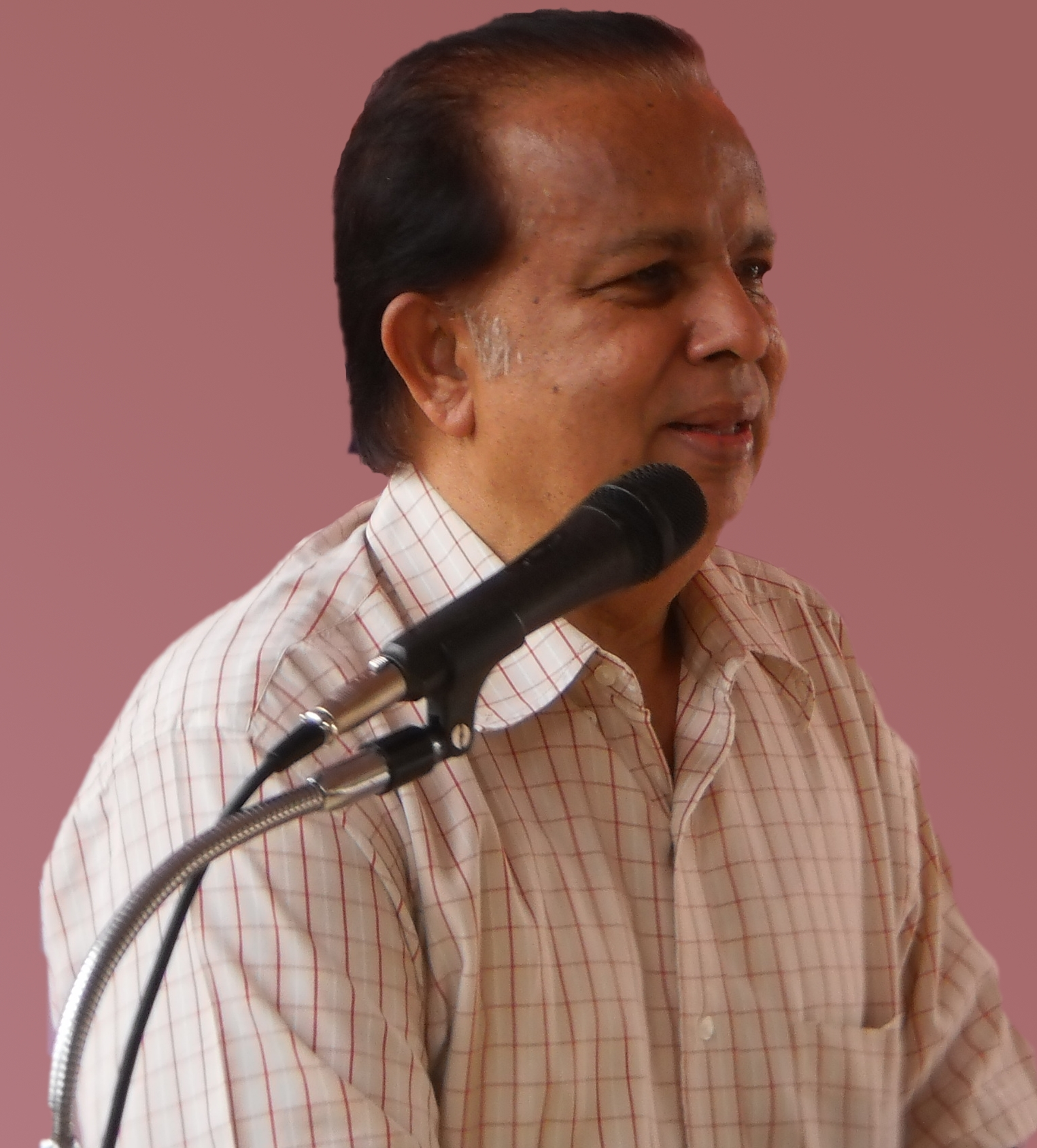 ജി മാധവന്‍ നായര്‍ പ്രസംഗിക്കുന്നു. G Madhavan Nair, Former Chairman, ISRO. വ്യക്തിപ്രാധാന്യത്തിനായി പശ്ചാത്തലം GIMP ഉപയോഗിച്ച് മാറ്റിയിരിക്കുന്നു.